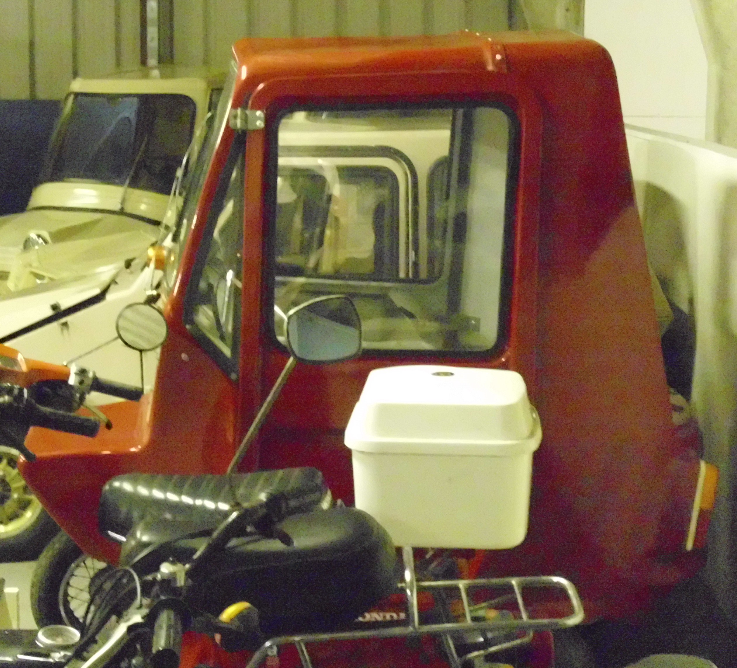 Mini-Cat